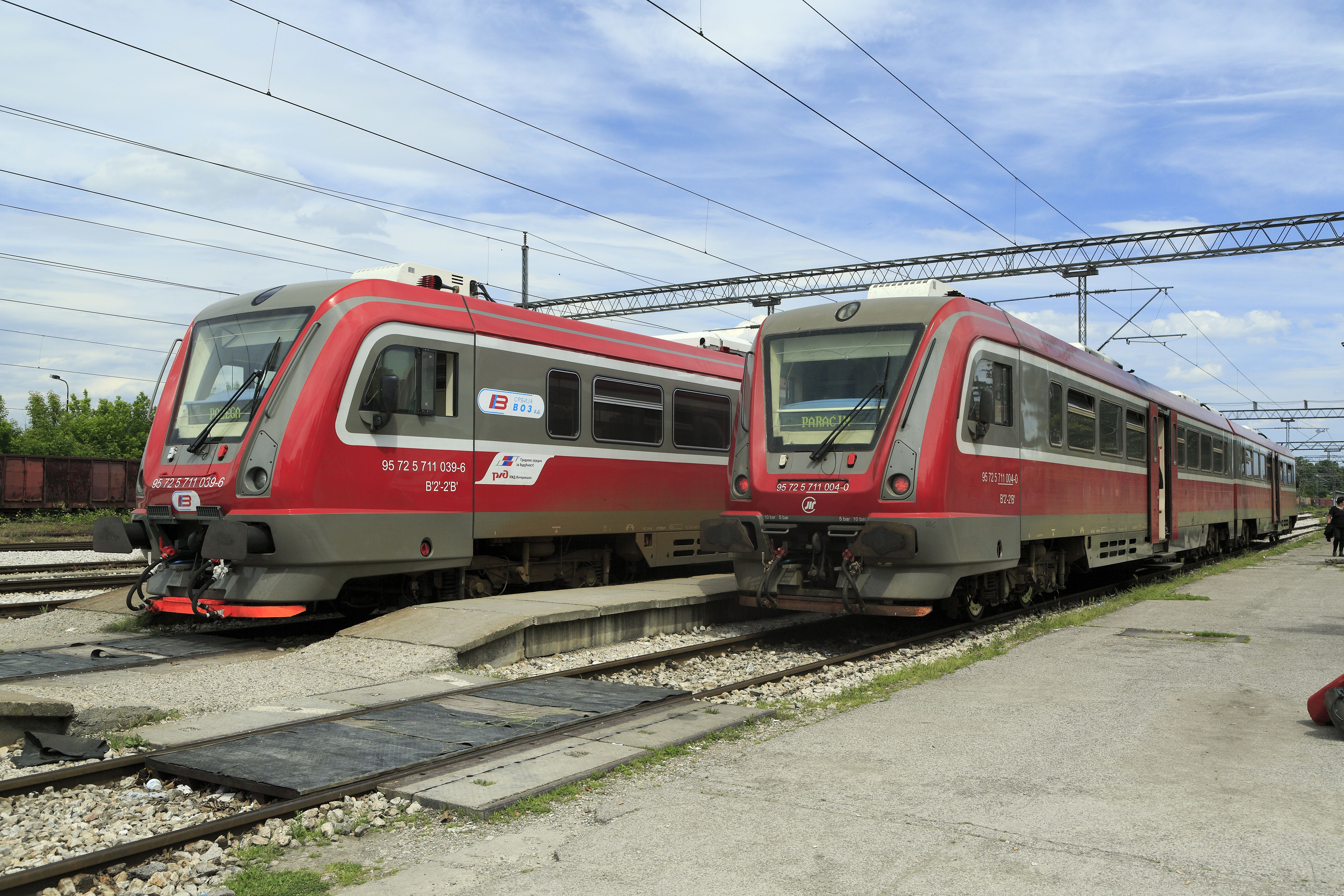 Bf Kraljevo, die Triebwagen verkehren nach Požega und Paraćin. Nicht verständlich ist der Betrieb mit Dieseltriebwagen bis Požega, die Strecke ist durchgehend elektrifiziert.